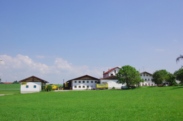 Rothmoos: Brauerei